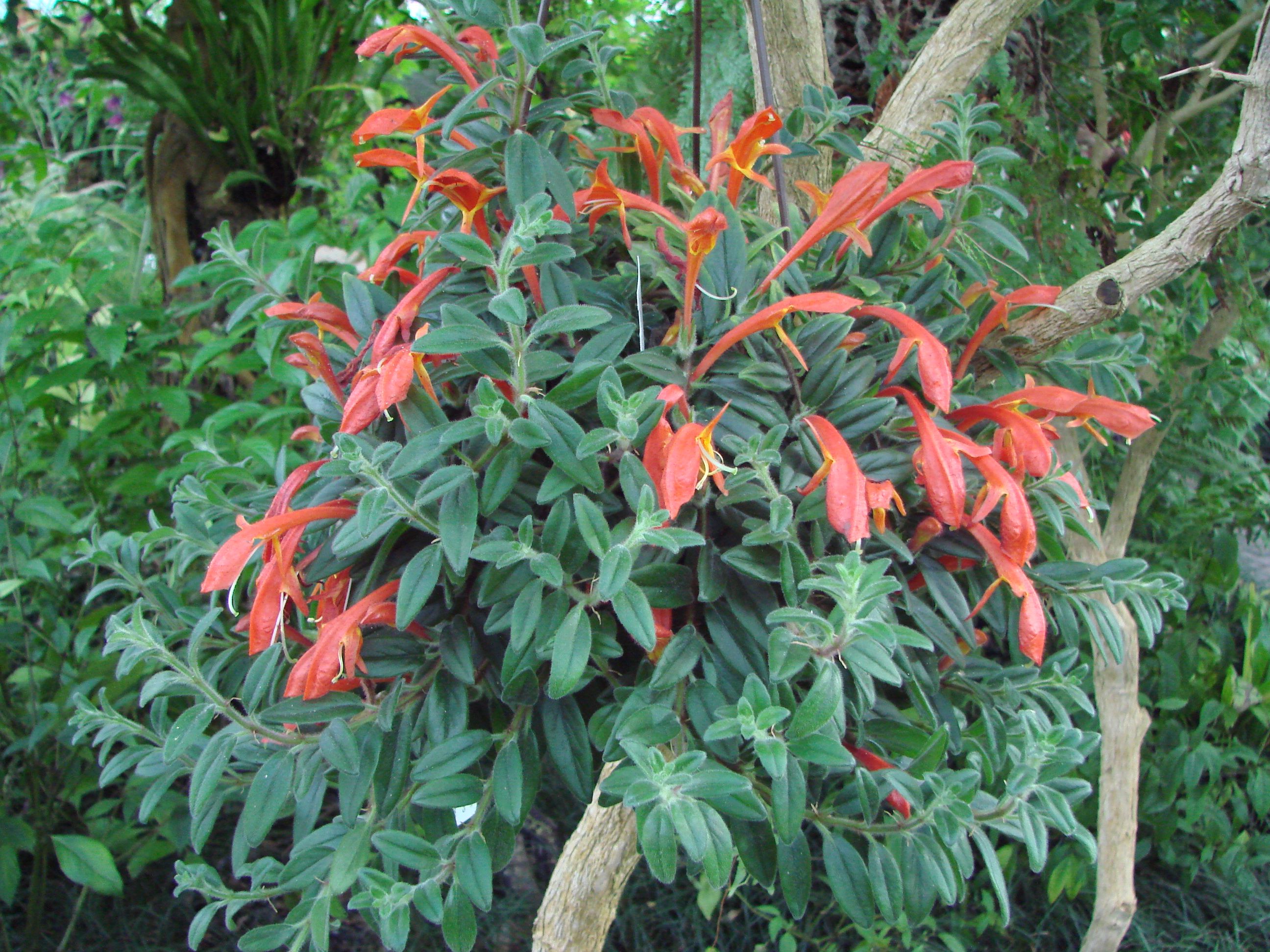 Jardin botanique de l'Université de Zurich (Suisse) : Columnea hirta subps. pilosissima